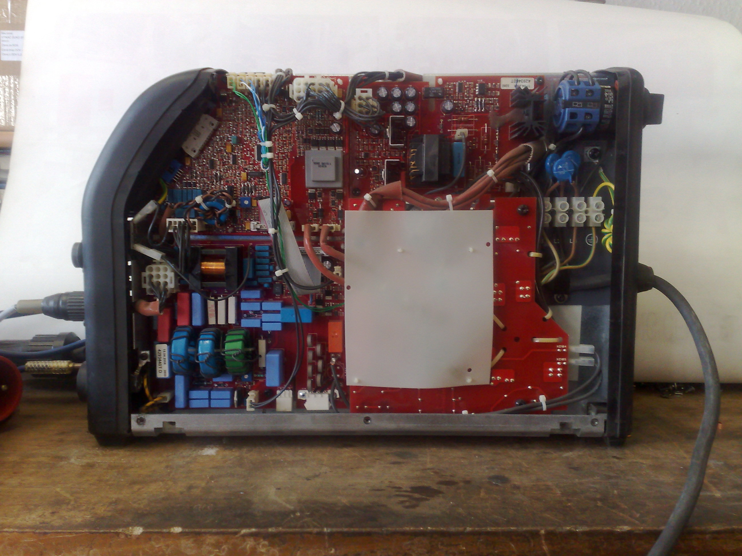 Notranjost TIG aparata.